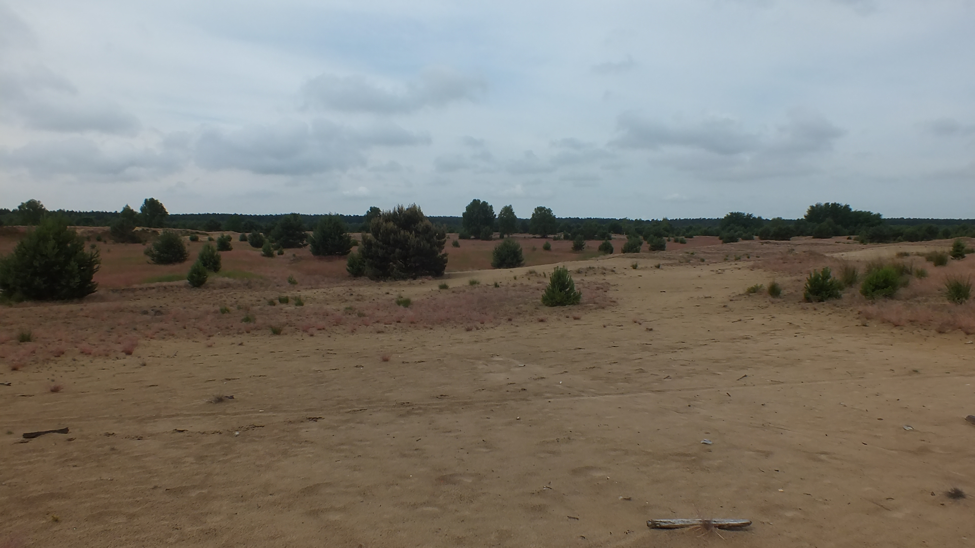 Sanddüne im FFH-Gebiet Annaburger Heide, Sachsen-Anhalt